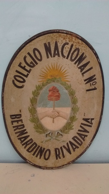 Escudo 2 Colegio N°1 Bernardino Rivadavia, CABA